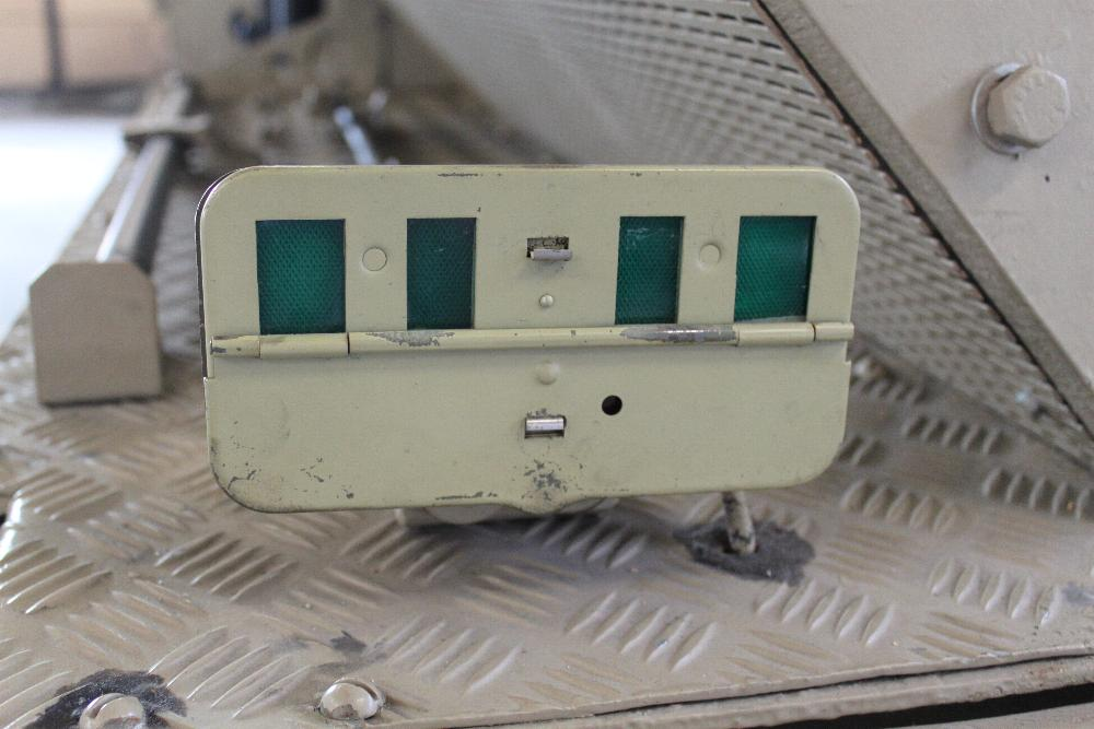 Notek Abstandsrücklicht. Bild zeigt Tarnbetrieb. Verbaut an allen Wehrmachtsfahrzeugen